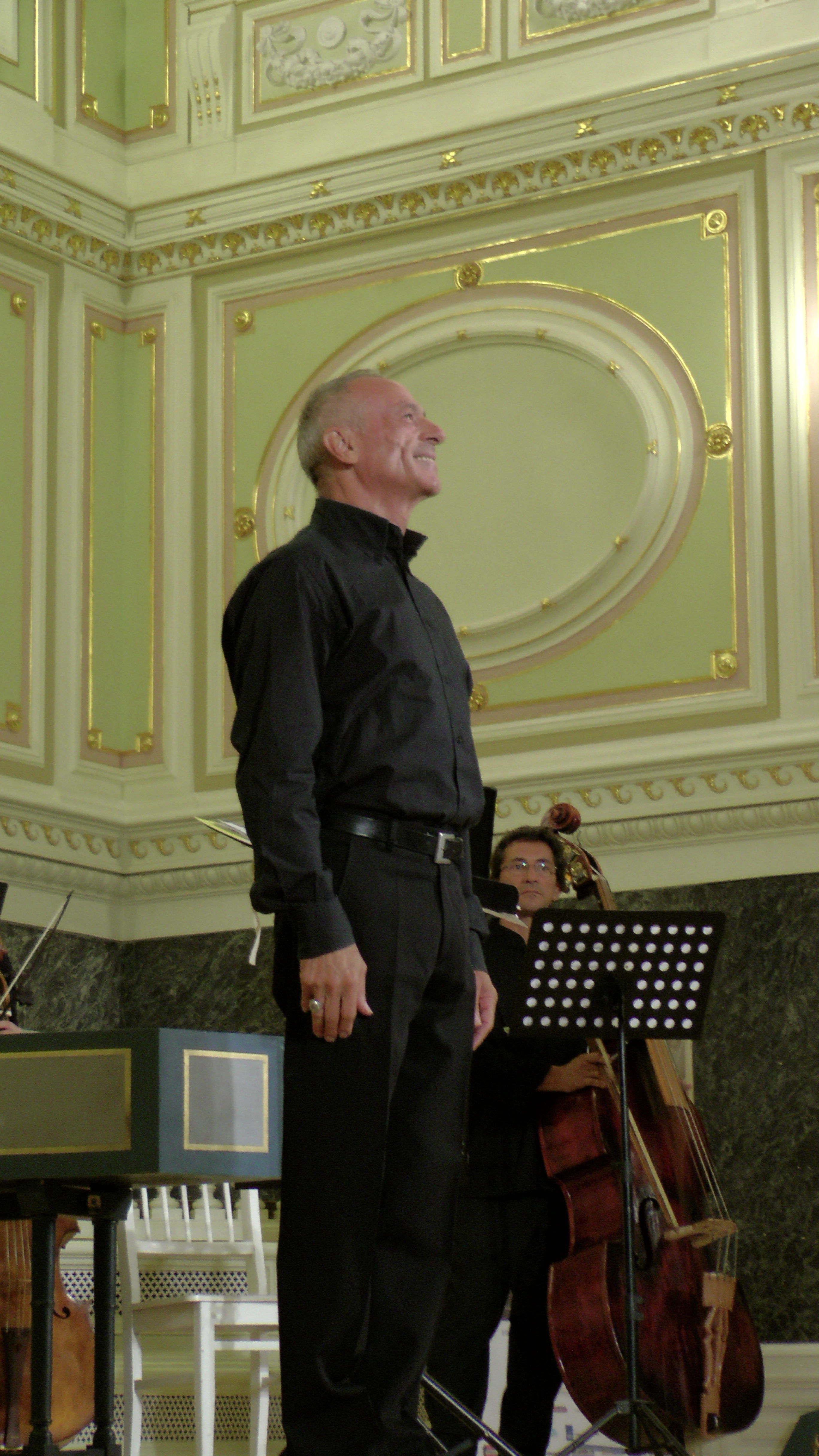 Пино де Витторио на фестивале Earlymusic. Санкт-Петербург, 17.09.2014. Академическая капелла.